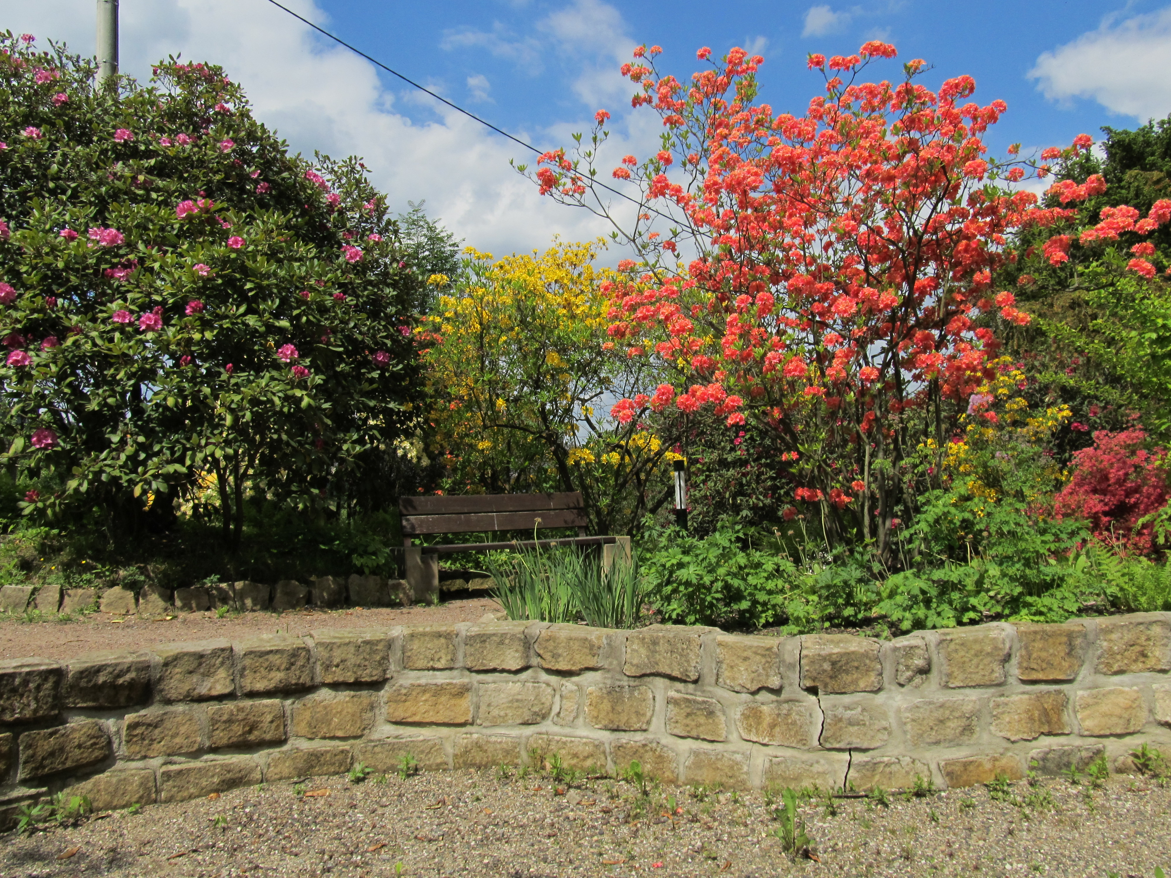 Pflanzen im Rhododendronpark Kleine Bastei in Rathen